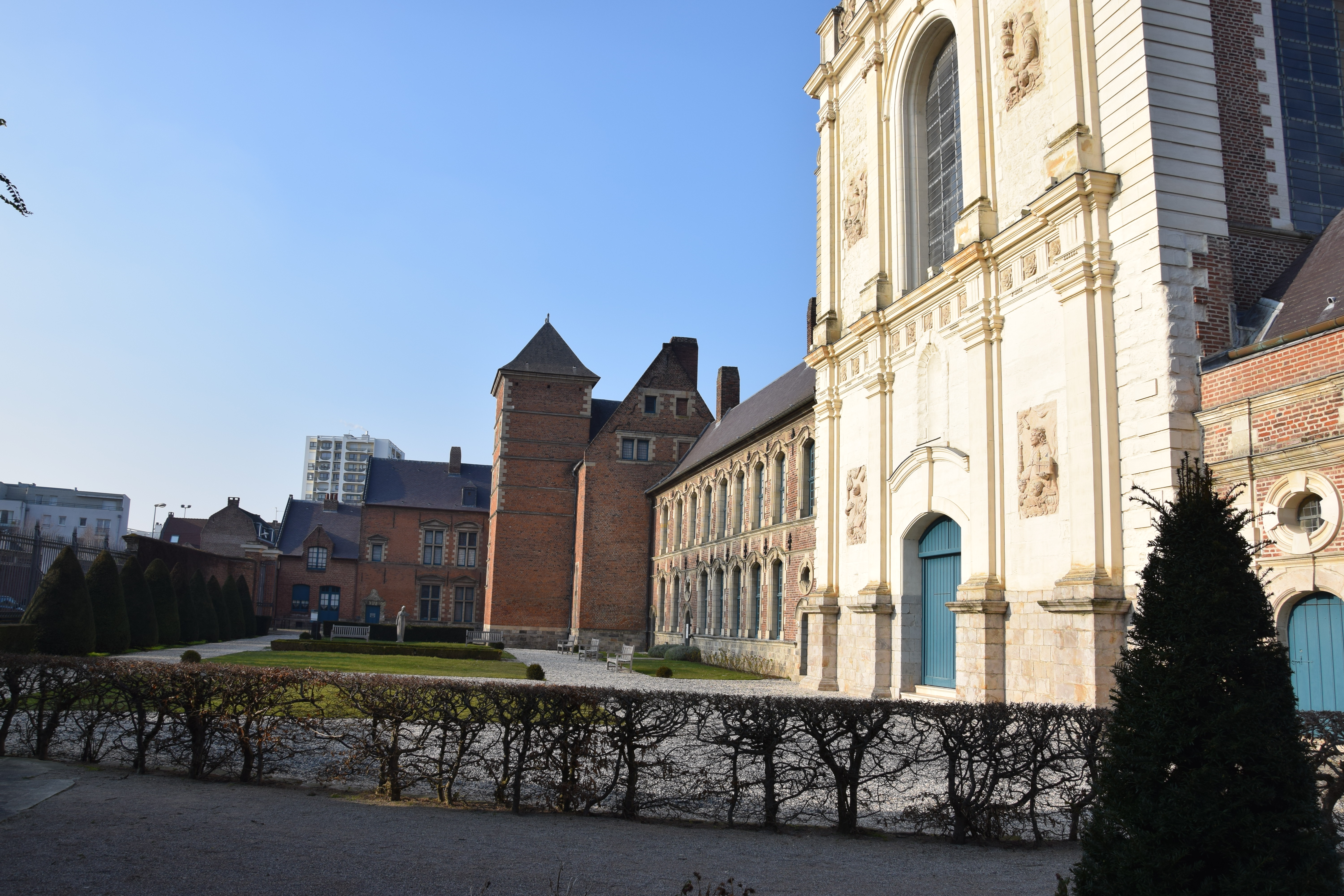 Musée de la Chartreuse - Extérieur